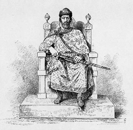 Великий Князь Всеволод Ольгович. 1139-1146 г. Изгнав из Киева преемника Ярополка, Вячеслава, Всеволод Ольгович ссорами родственников поддерживал междоусобия, жил и скончался среди походов.